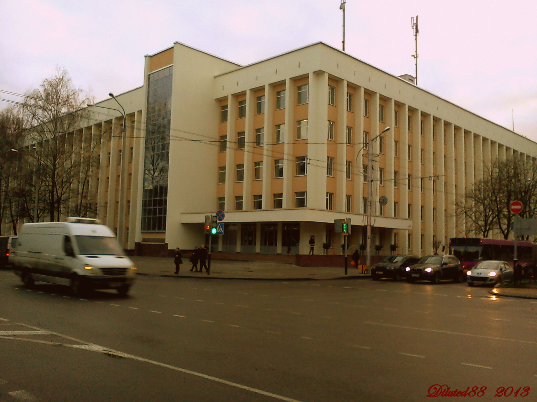 Беларускі дзяржаўны універсітэт транспарту ... Belarusian State University of Transport